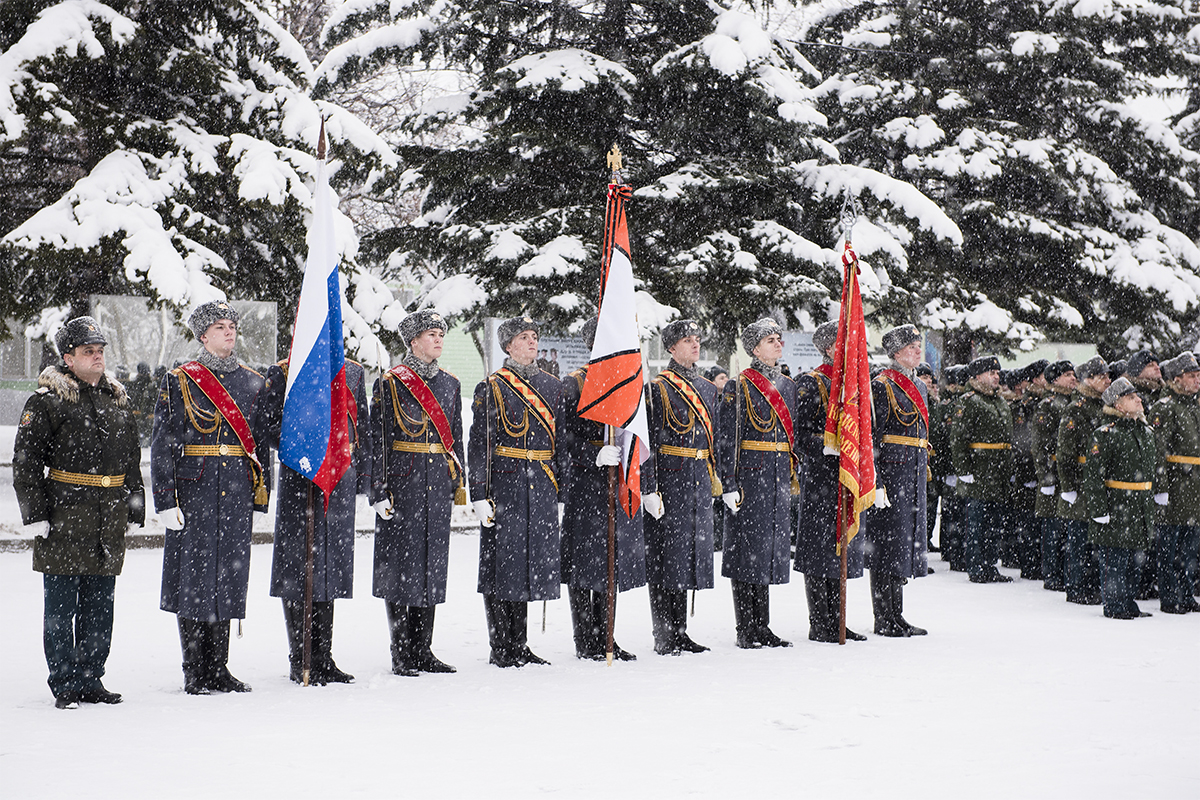 1-я гвардейская танковая Краснознамённая армия отметила 75-ю годовщину формирования.